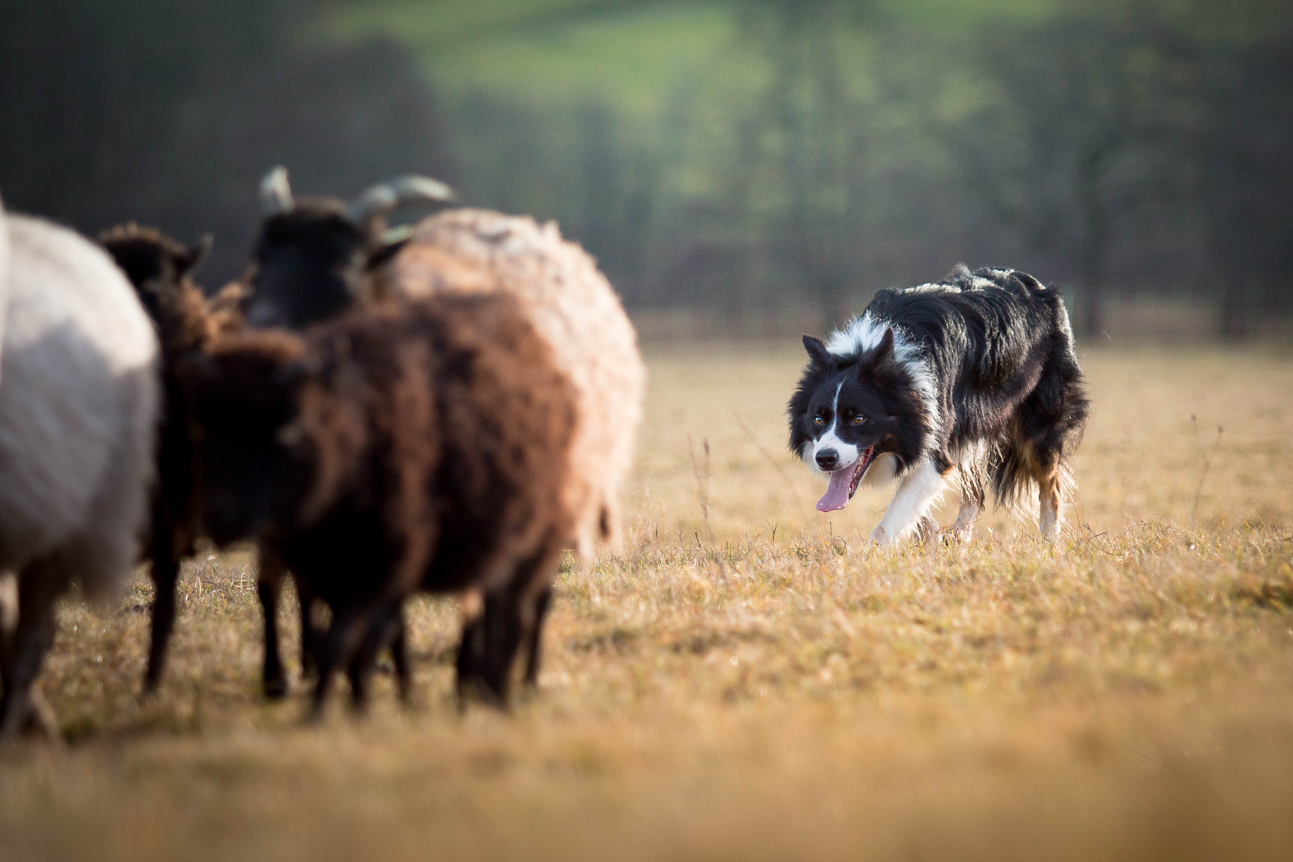 travaille du border collie sur mouton